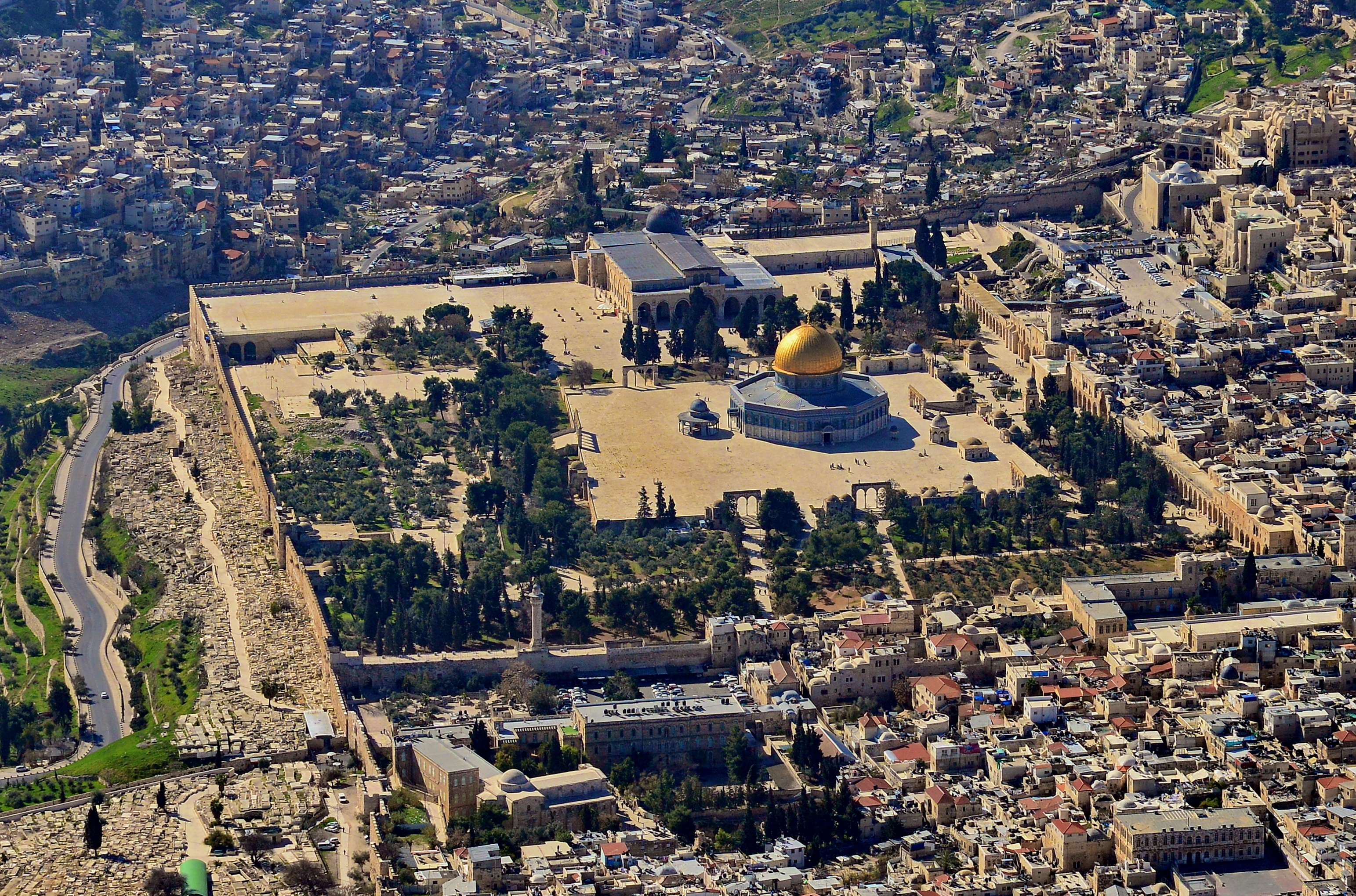 הר הבית הוא מתחם מוגבה ושטוח בן כ־140 דונם במזרח העיר העתיקה בירושלים, שהינו הרחבה מלאכותית מתקופת הורדוס (בן המאה הראשונה לפני הספירה), של הר המוריה הקדום.